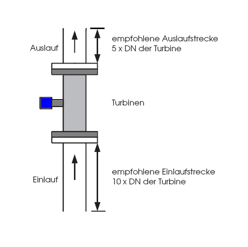 Einbaubeispiel Turbinen-Durchflussmesser